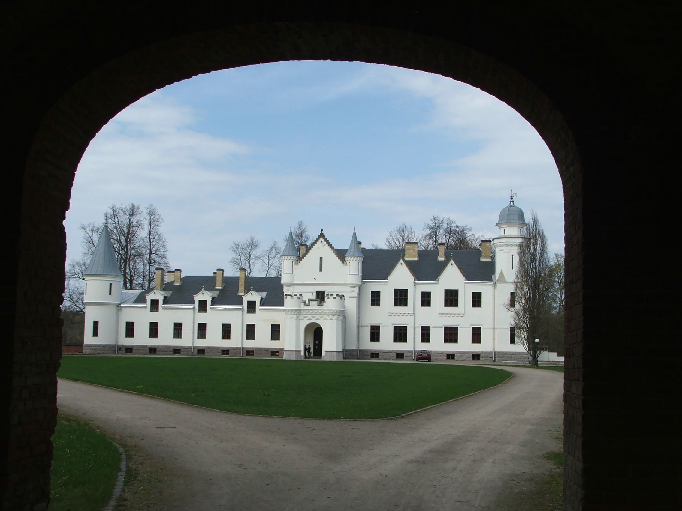 Vaade lossile väravast